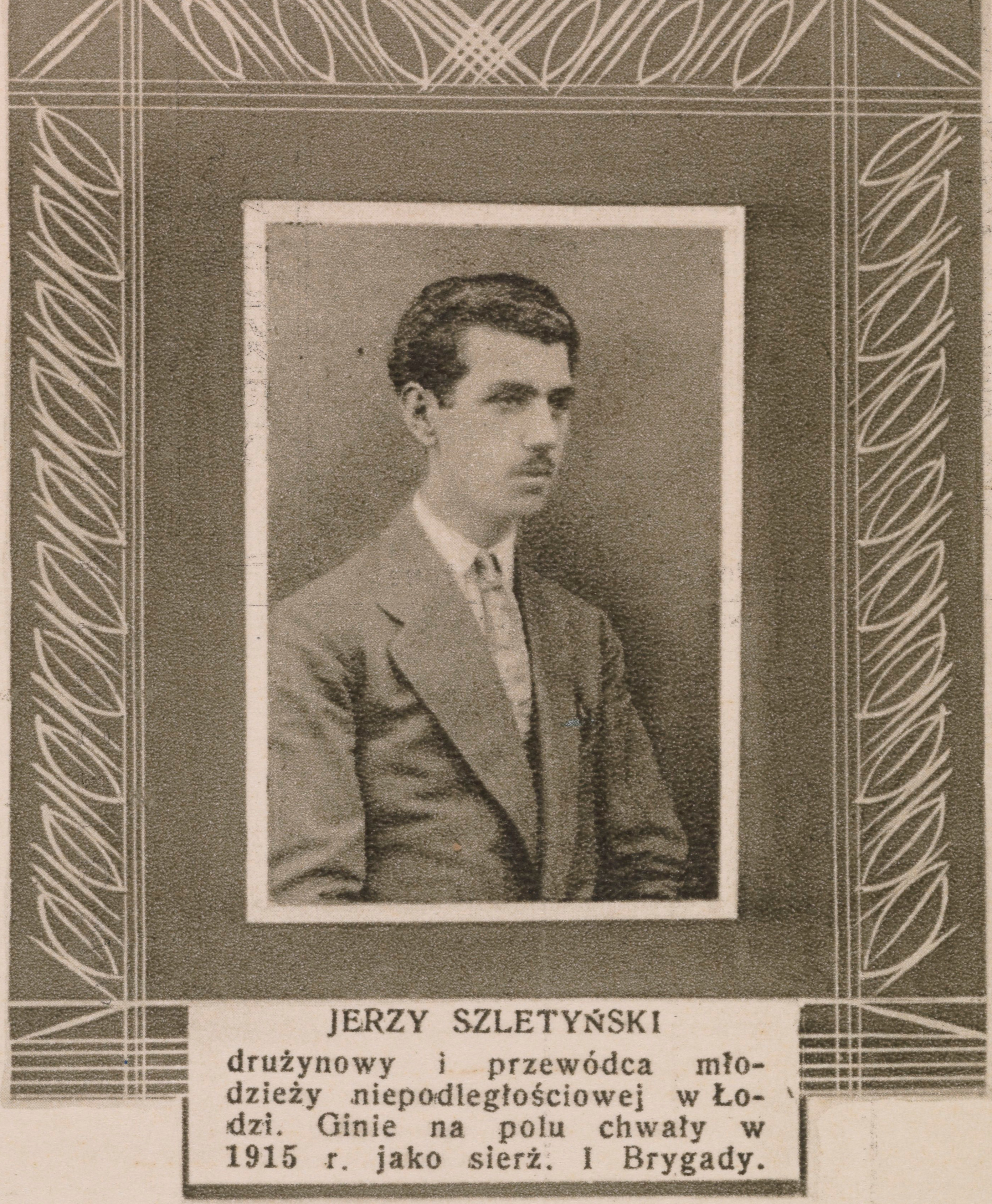 Jerzy Szletyński, pocztówka z 1935 roku wydana z okazji 35-lecia harcerstwa polskiego